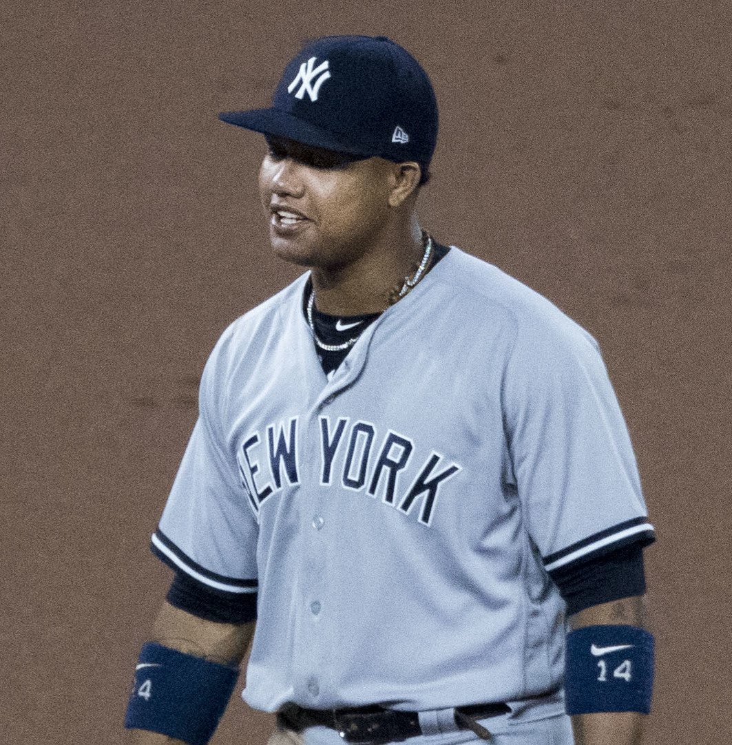 Yankees at Orioles 9/5/17